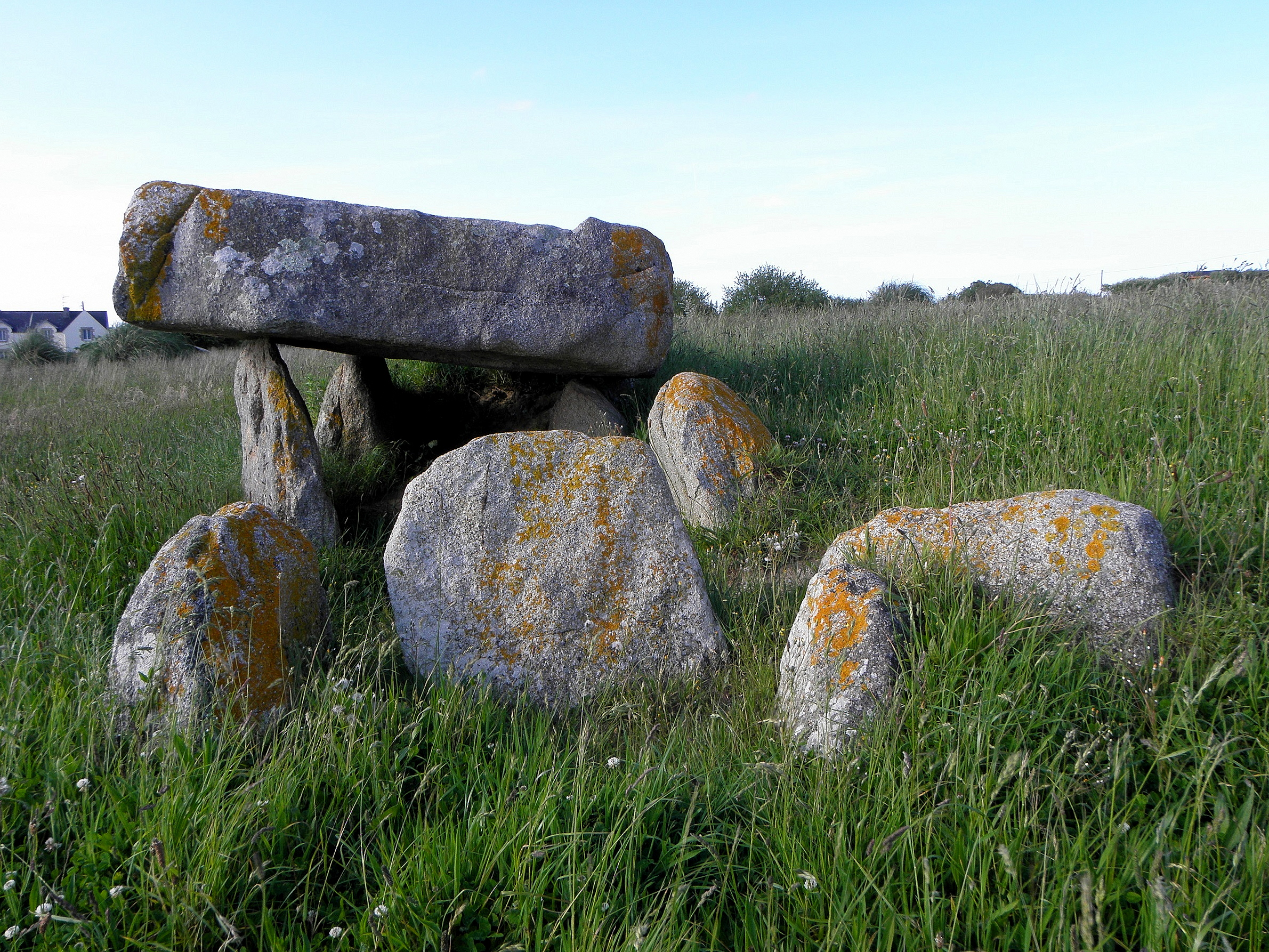 Dolmen de Dievet en Plounéour-Trez (29).